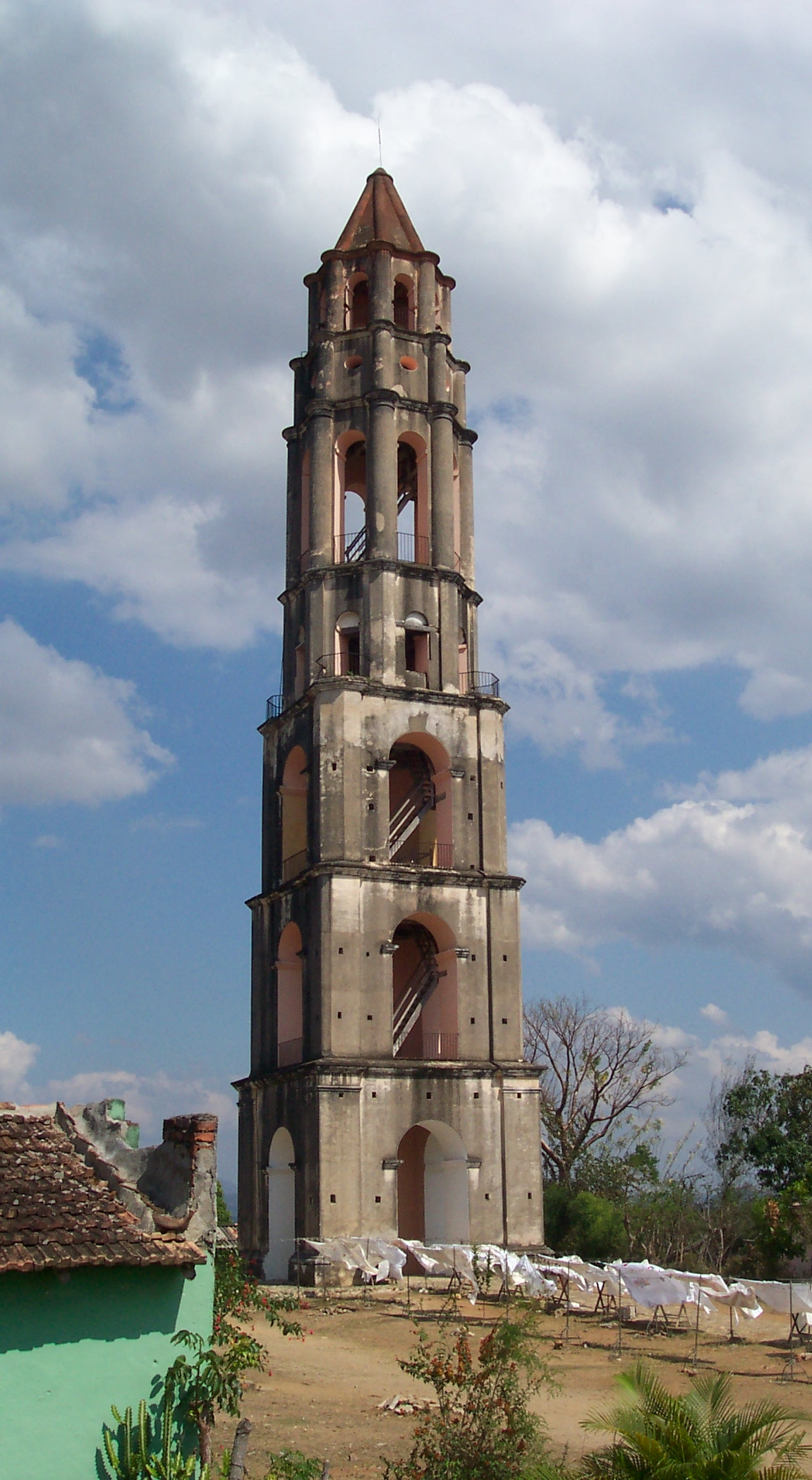 Tower at Manaca Ignaza, Valle de los Ingenios, Cuba